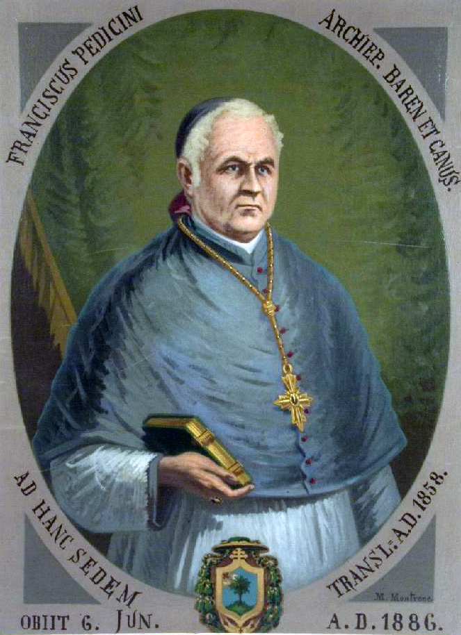 Ritratto di Monsignore Francesco Pedicini, / Montrone M. sec. XIX, Dipinto di Monsignore Francesco Pedicini